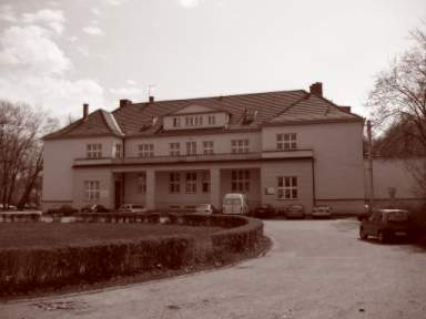 Tarnów Restauracja Kasyno